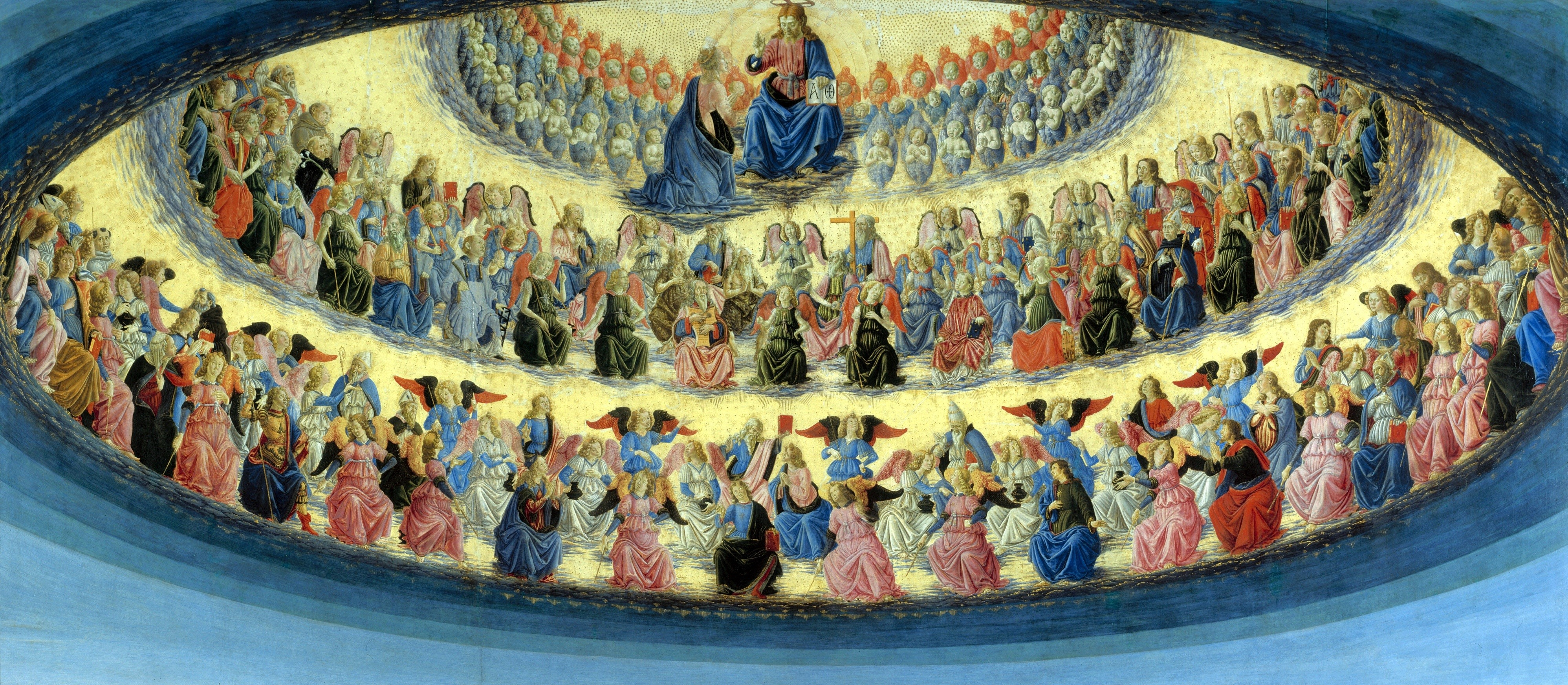 Coro di angeli, dettaglio dall'Assunzione della Vergine di Francesco Botticini